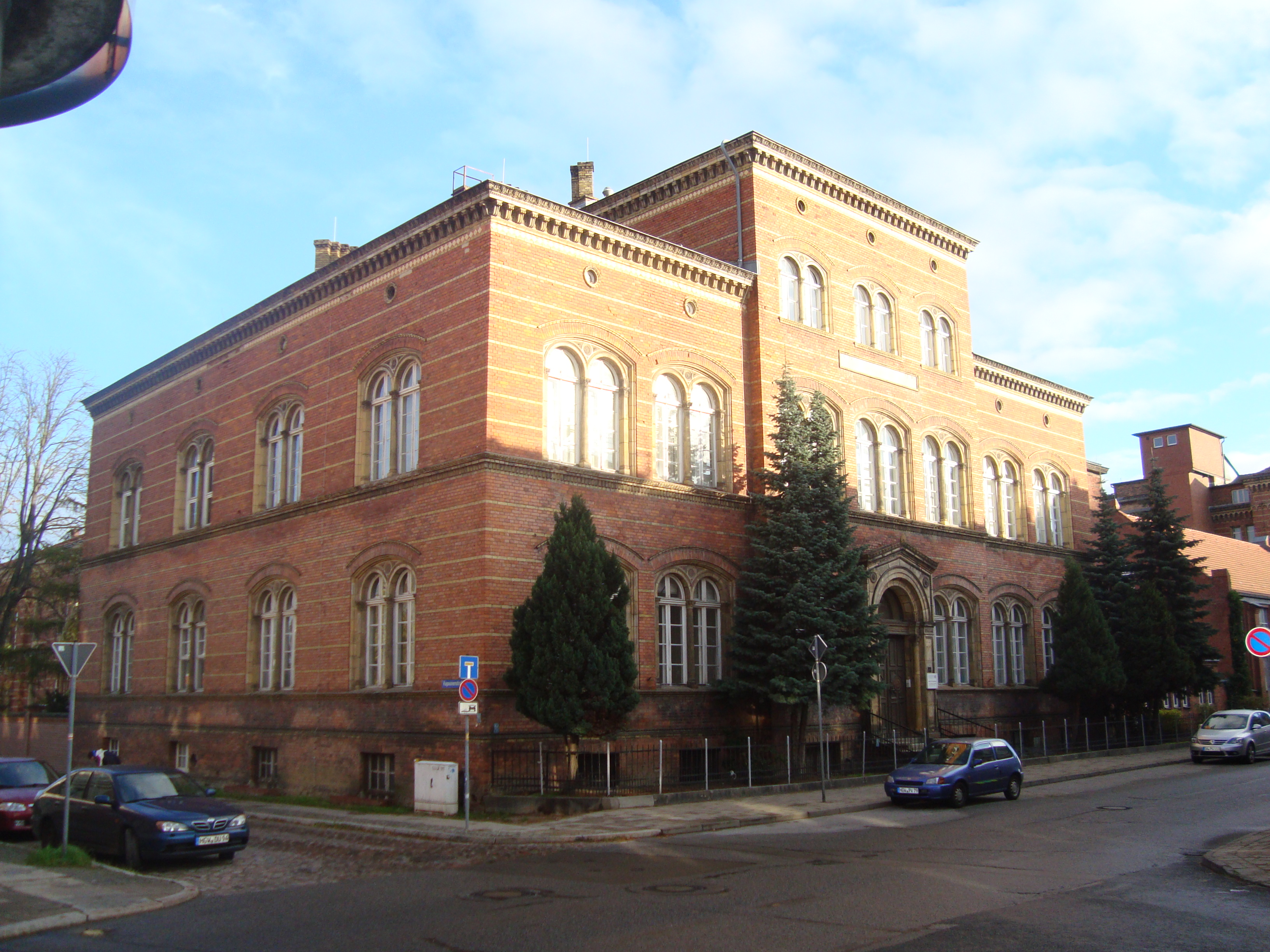 Institut für Pharmakologie in der Friedrich-Loeffler-Straße 23d in Greifswald.